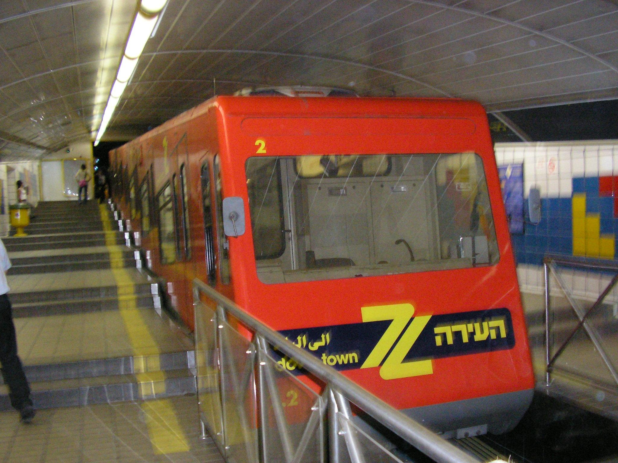 The Carmelit in Haifa, Israel. הכרמלית בחיפה, ישראל